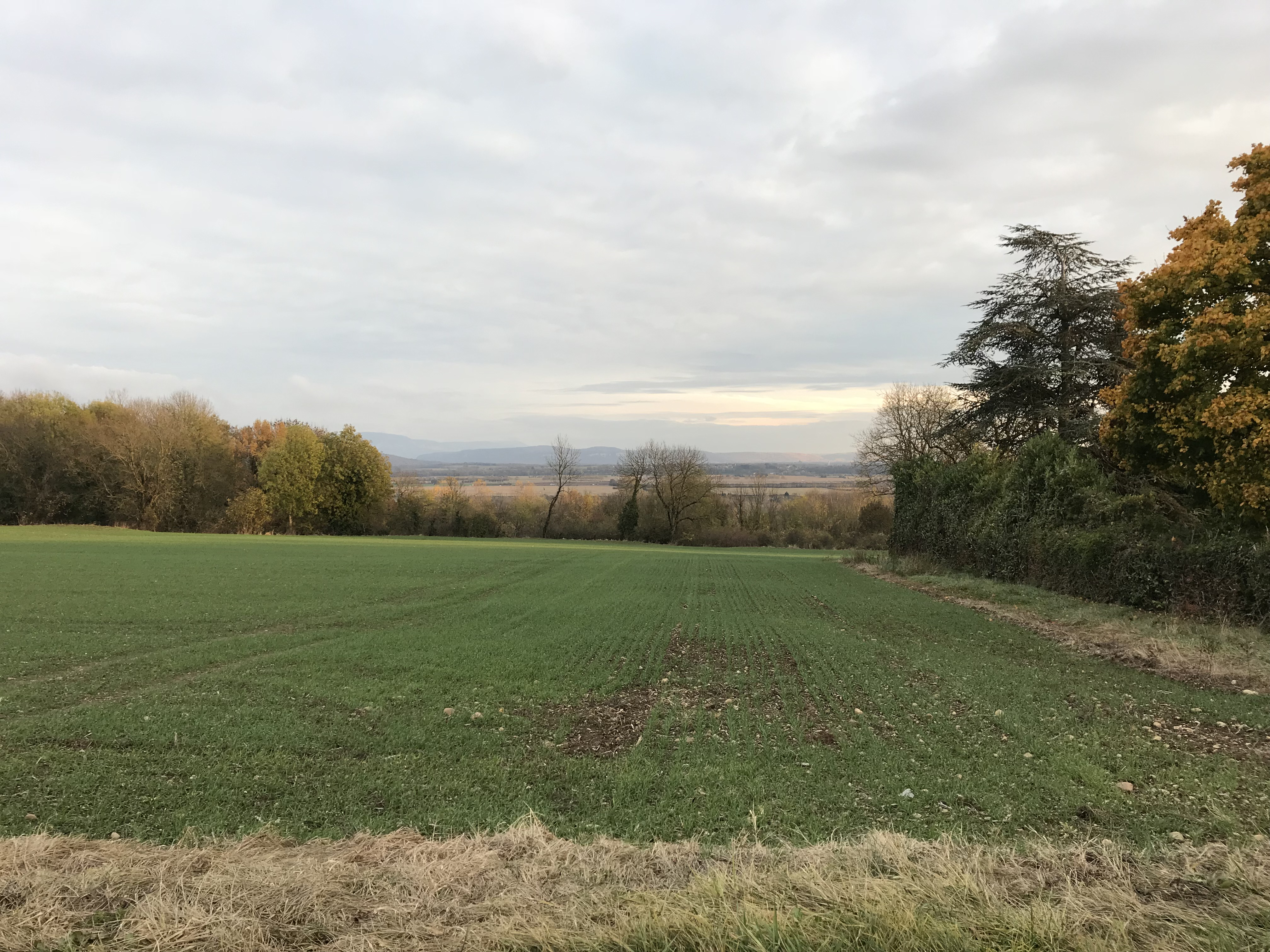 Paysage au niveau du hameau de Montaplan près de Loyes (Villieu-Loyes-Mollon, Ain, France).